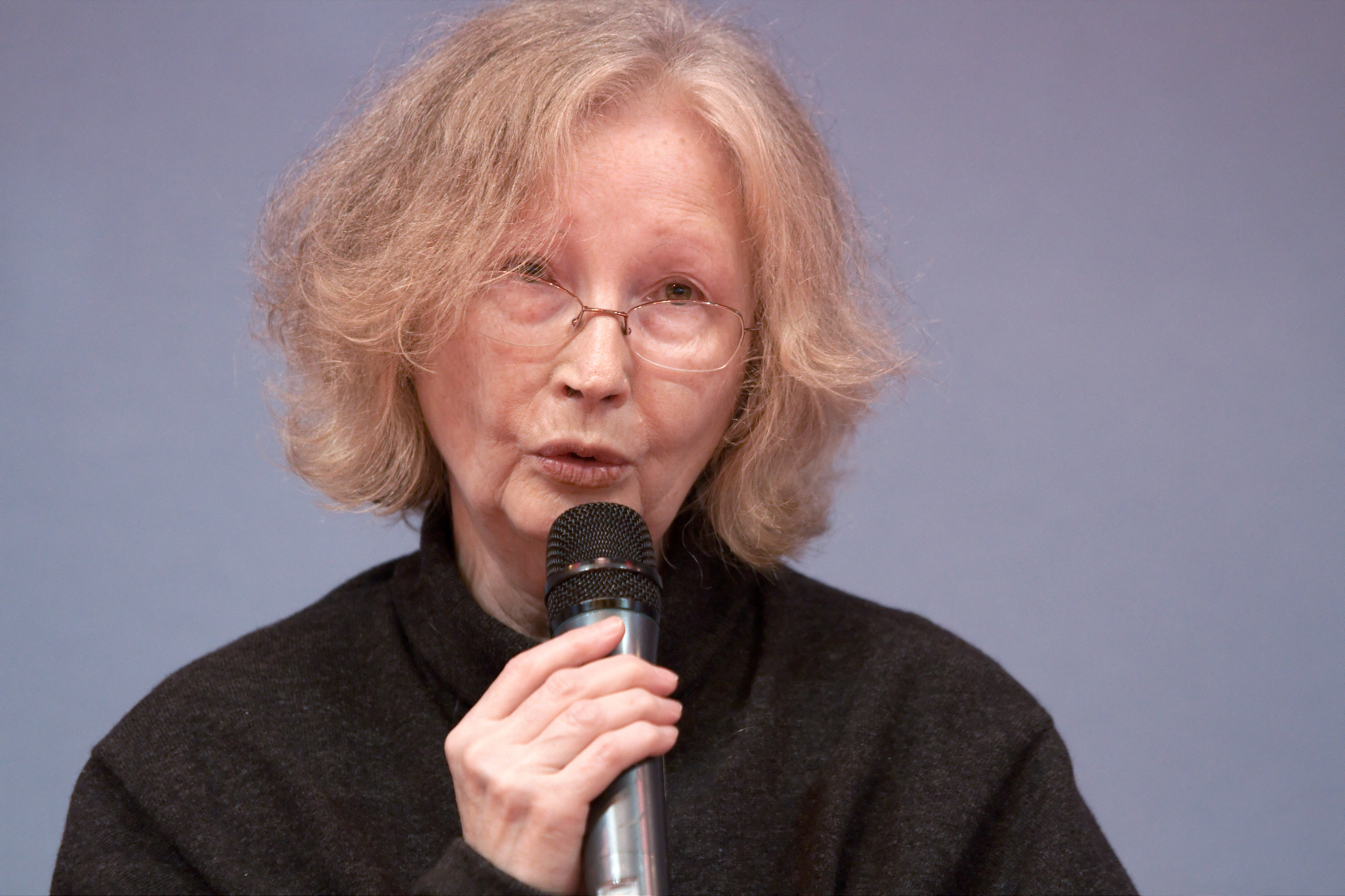 Chantal Chawaf au Salon du livre de Paris lors du débat Pourquoi les Femmes aujourd'hui ?